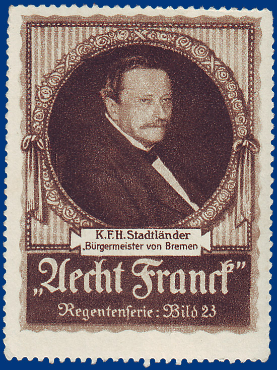 Karl F.H. Stadtländer (1844 - 1916), German politician, mayor of Bremen in 1914